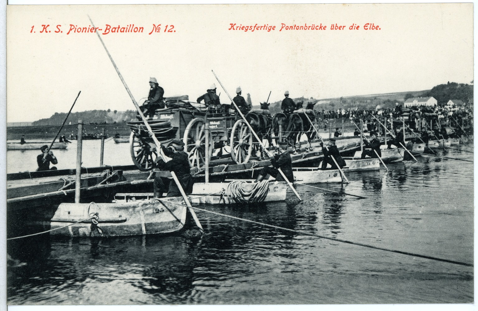 Königlich Sächsisches Pionier-Bataillon Nr. 12 This postcard is from publisher Brück & Sohn in Meißen ( postcard has a unique number 11061 and is available in a higher resolution at the publisher. This images was uploaded in a cooperation project between Wikipedians and the publisher.